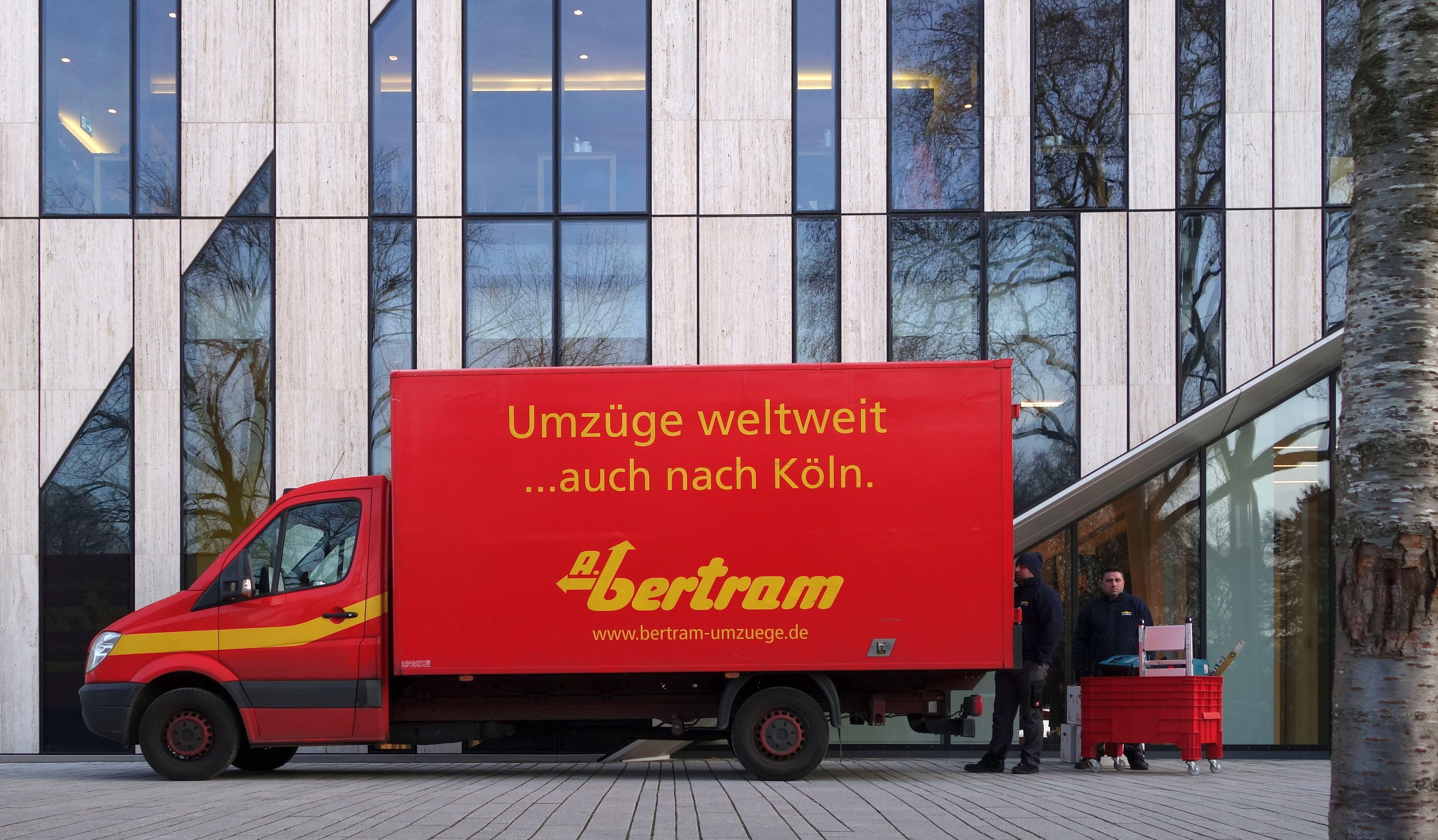 Düsseldorf, vor dem Kö-Bogen: Lastwagen der Firma A. Bertram, Düsseldorf: Umzüge weltweit ...auch nach Köln.